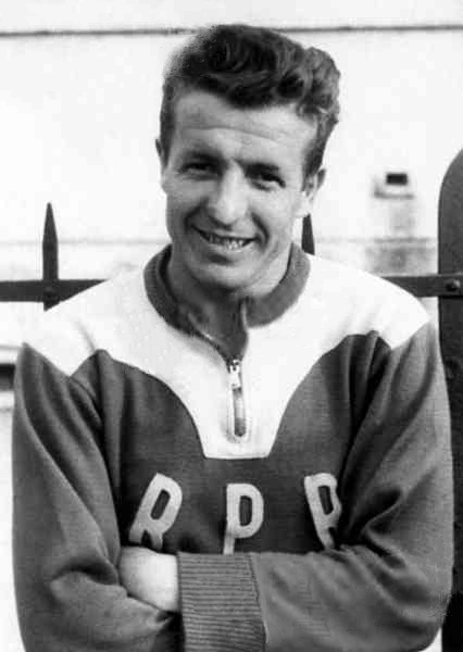 Alexandru Apolzan in Bucharest